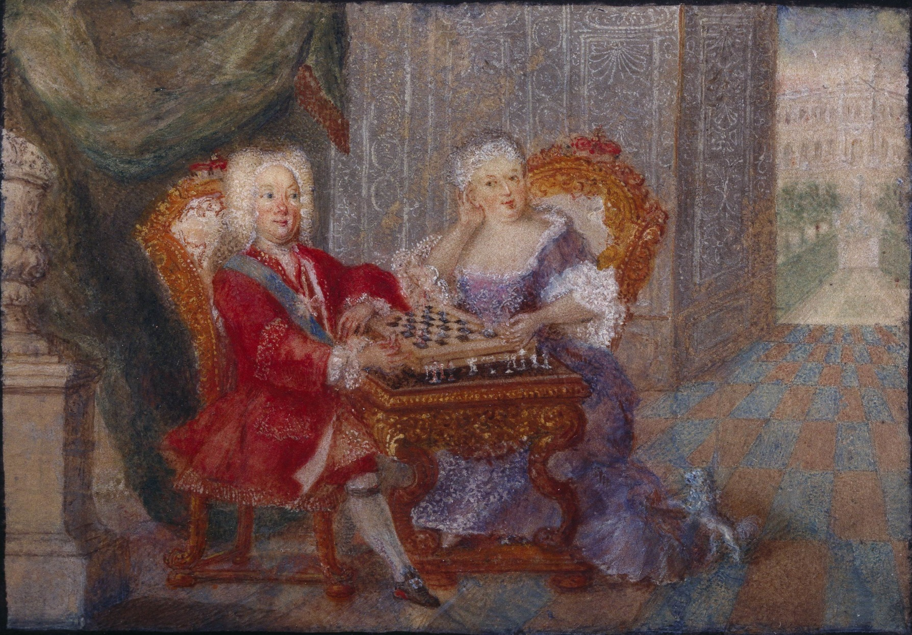 Bildnis: ganze Figur sitzend, halb rechts; mit Hund,zusammen mit August III., König von Polen, Schach spielend. Windt S. 16 (V/16) - Ausstellung: Wien, 1905, Nr. 148.